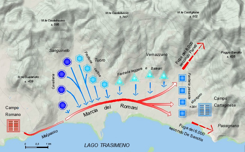 Disposizione delle truppe cartaginesi e delle legioni romane nella battaglia del lago Trasimeno in accordo con quanto teorizzato dagli storici Fuchs, Pareti e De Sanctis. Il sito della battaglia venne da loro, indipendentemente l'uno dall'altro, identificato ad inizio XX° sec nella valle che corre lungo la sponda settentrionale del Trasimeno, circondata da alte colline che partono dal Monte Gualandro (W) a Montigeto (E). Nella mappa viene evidenziata la via di fuga dei 6.000 Romani secondo Pareti (verso le colline) e secondo Fuchs/De Sanctis (verso Passignano), unica divergenza di opinione sostanziale tra i tre